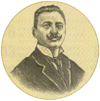 Székely László